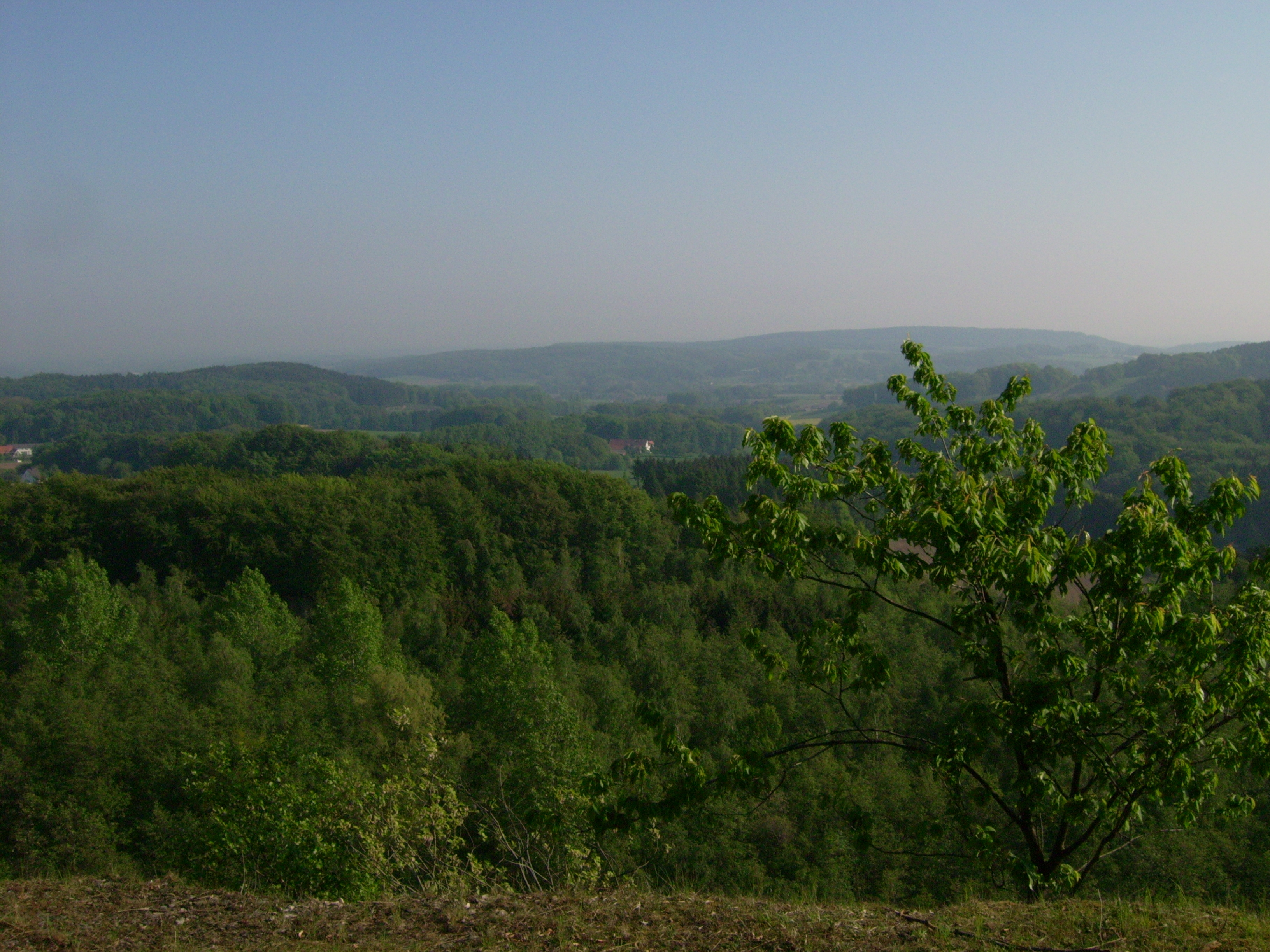 Blick vom Aussichtspunkt auf dem Westerbecker Berg bei Lienen auf Holperdorp, Hagen und Hüggelgebiet